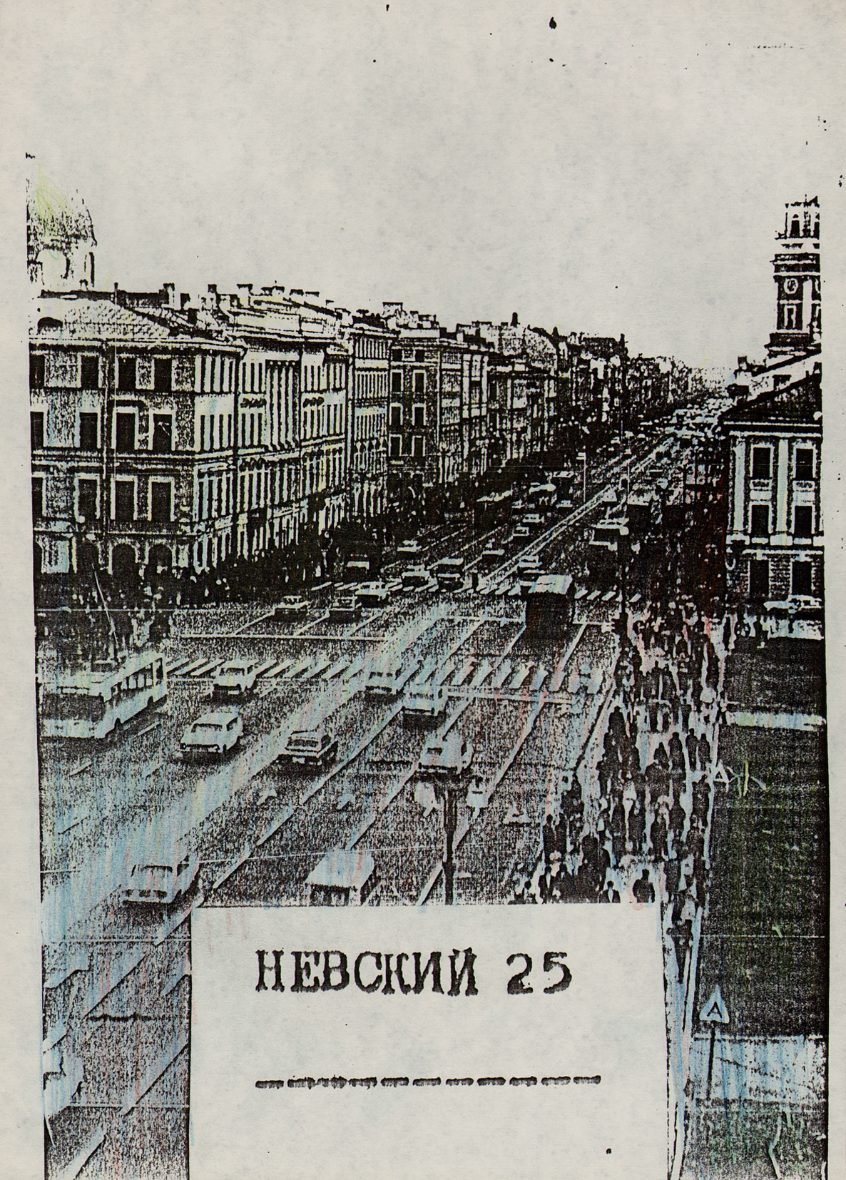 Афиша выставки объединения Невский-25. Ленинград.